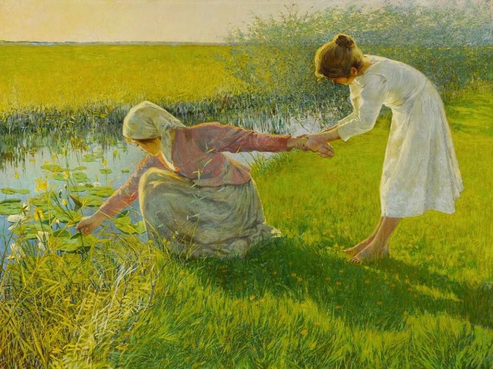 "Primi fiori", olio su tela, 180 x 237 cm.